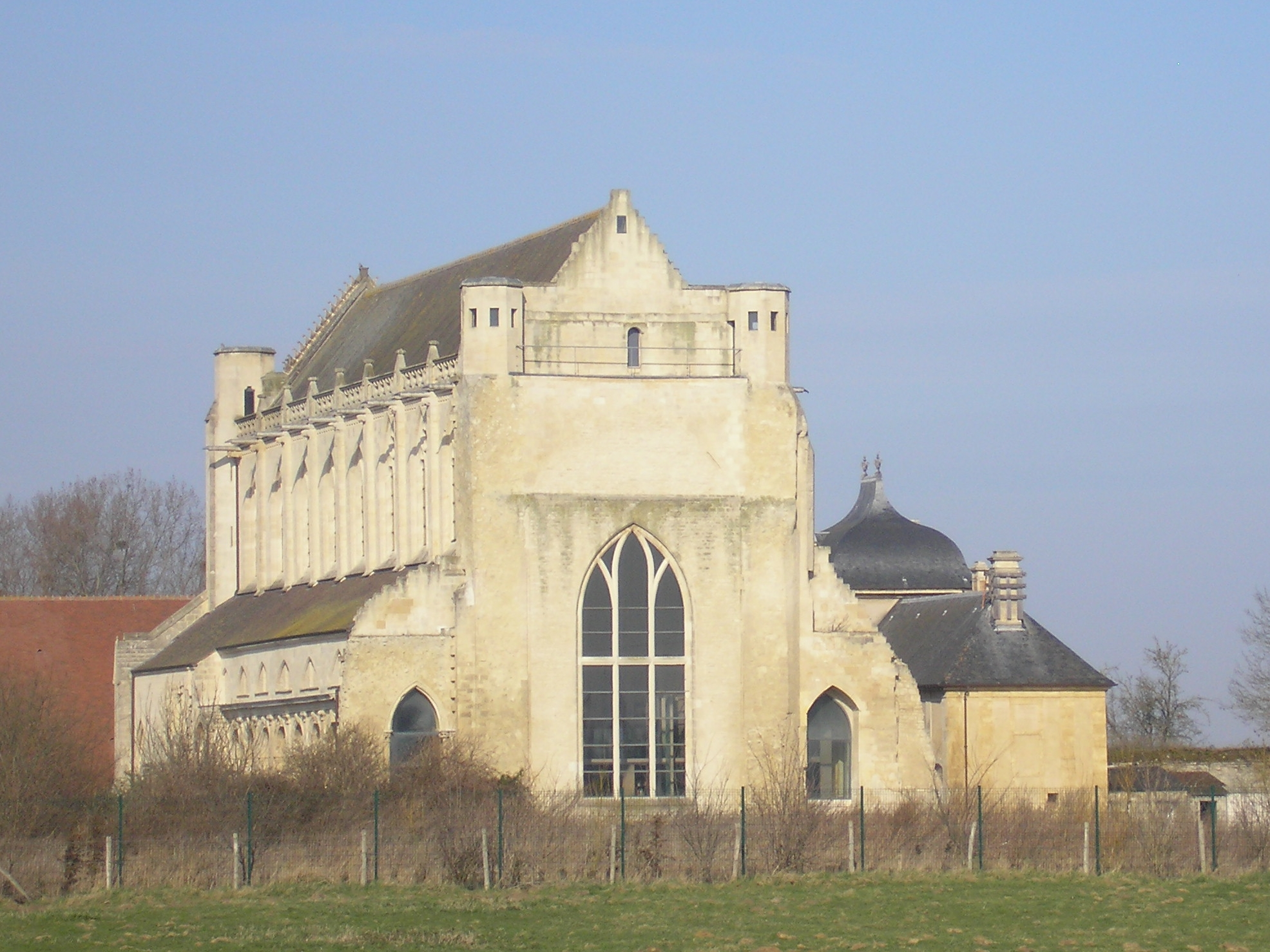 Saint-Germain-la-Blanche-Herbe (Normandie, France). L'abbaye d'Ardenne : l'abbatiale et la porte Saint-Norbert (à droite).